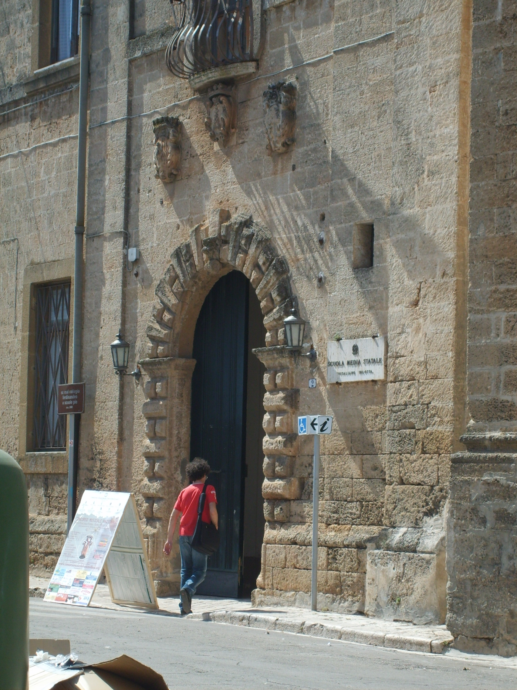 Portale Scuole Pie